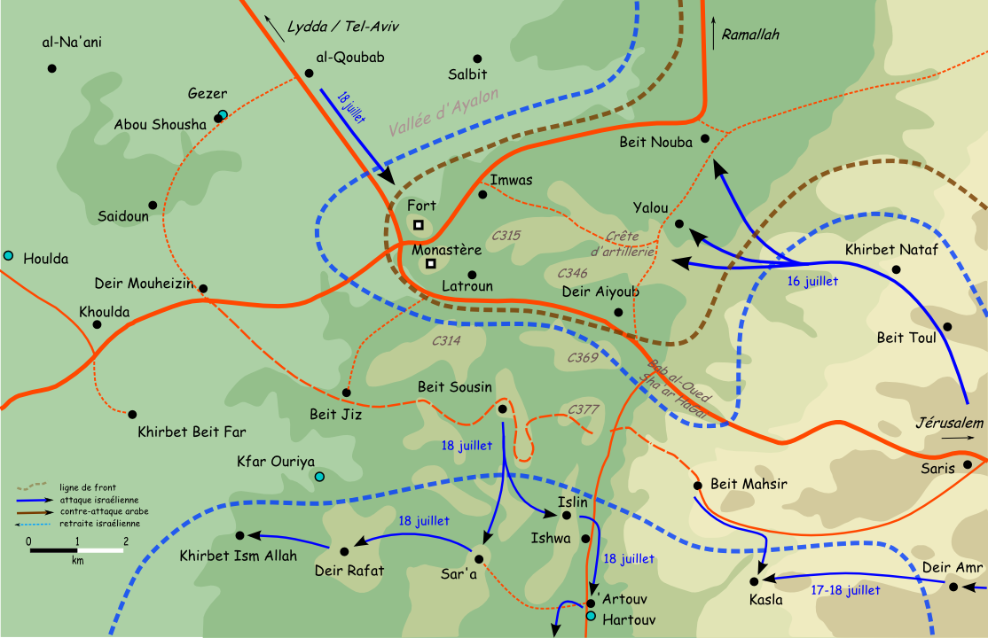 Zone de Latroun (16 juillet 1948). Emiliàn e rumagnòl: Latrun area (16 july 1948).